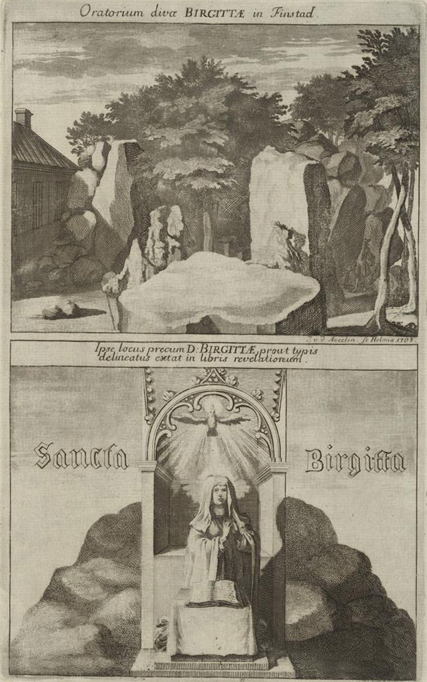 Oratorium divae Birgittae in Finstad. Ipse locus precum D: Birgittae prout typis delineatus extat in libris revelationum.